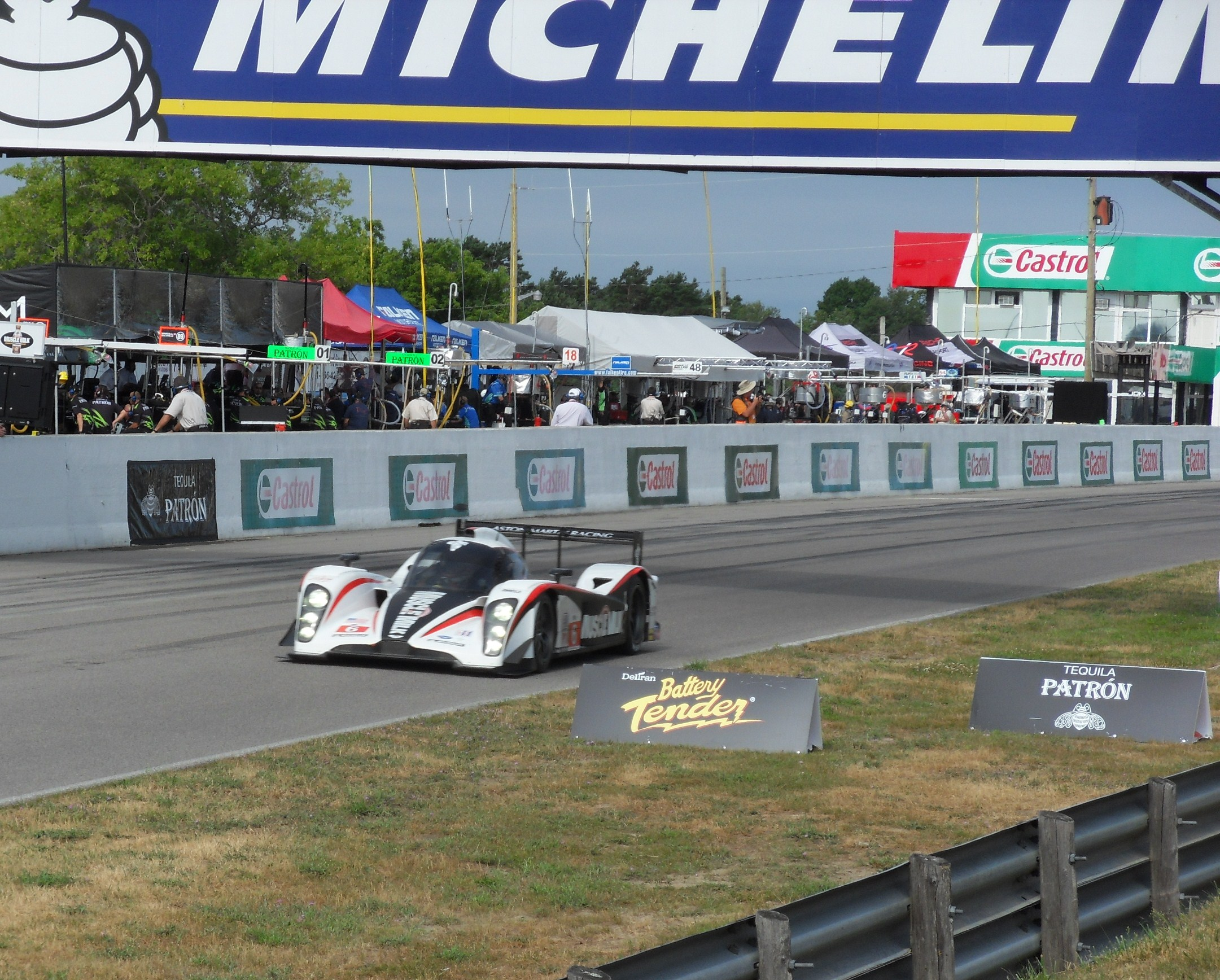 Faaast....